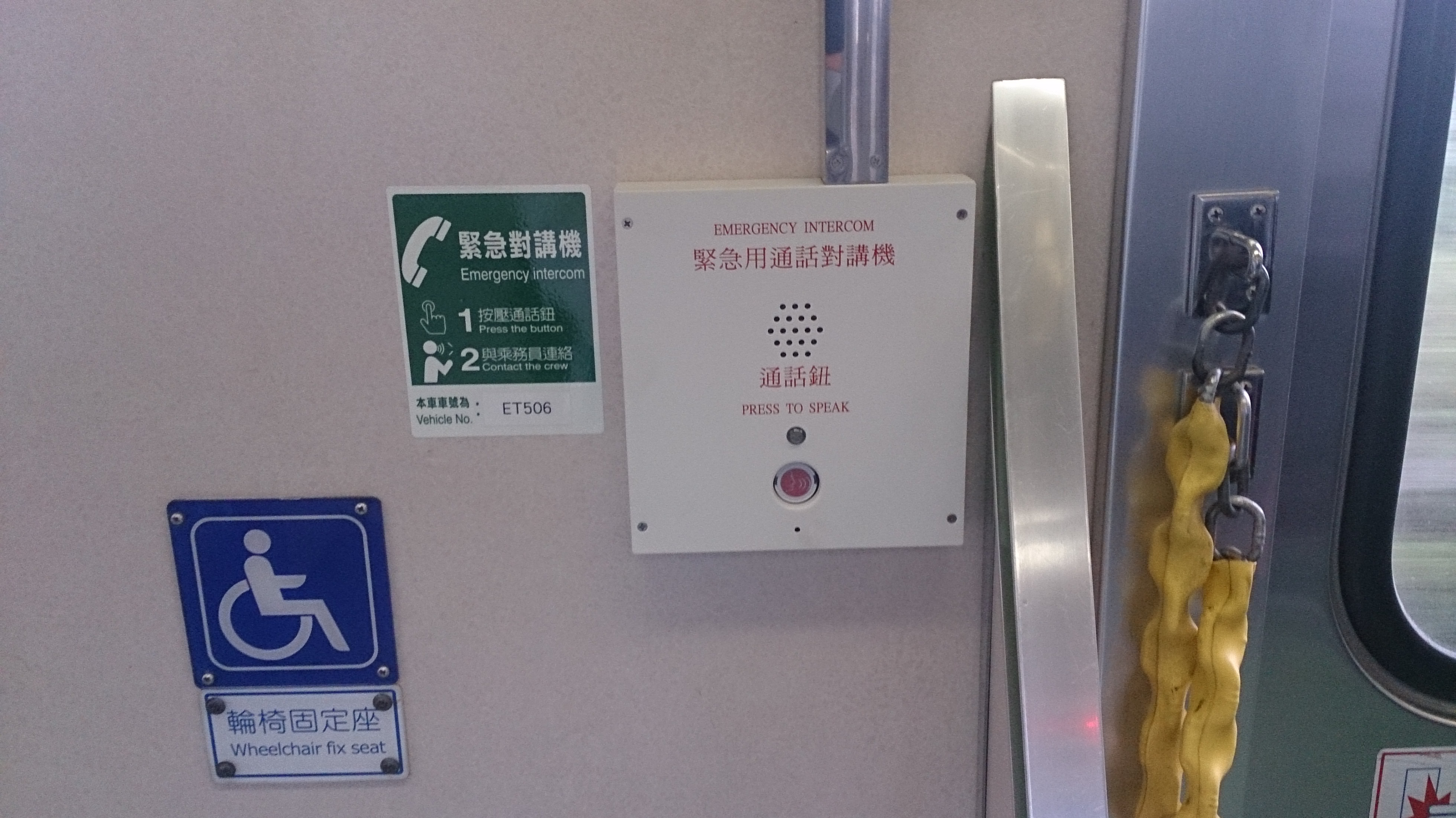 中文（台灣）: 臺灣鐵路管理局EMU500型電聯車ET506改造後的緊急對講機。